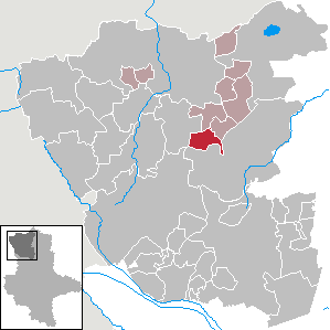 (Original text: Zethlingen im Altmarkkreis Salzwedel)